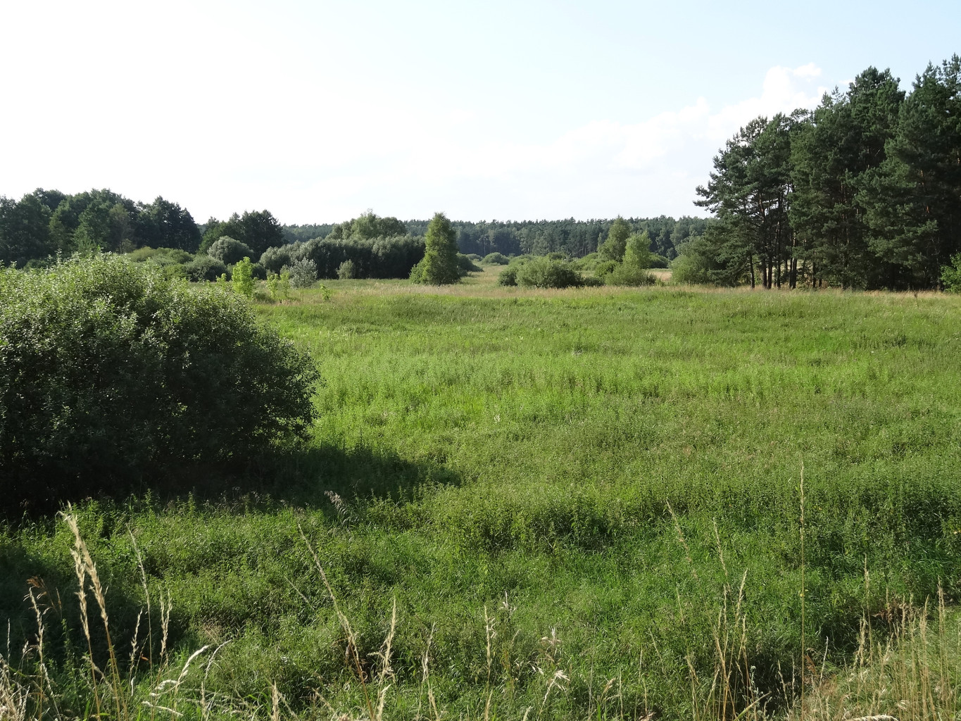 Łąki w miejscowości Białe Błota koło Bydgoszczy